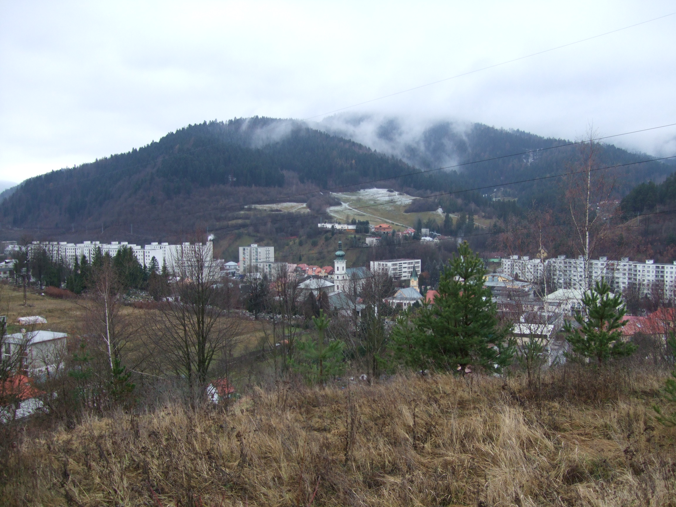 Pohľad na mesto